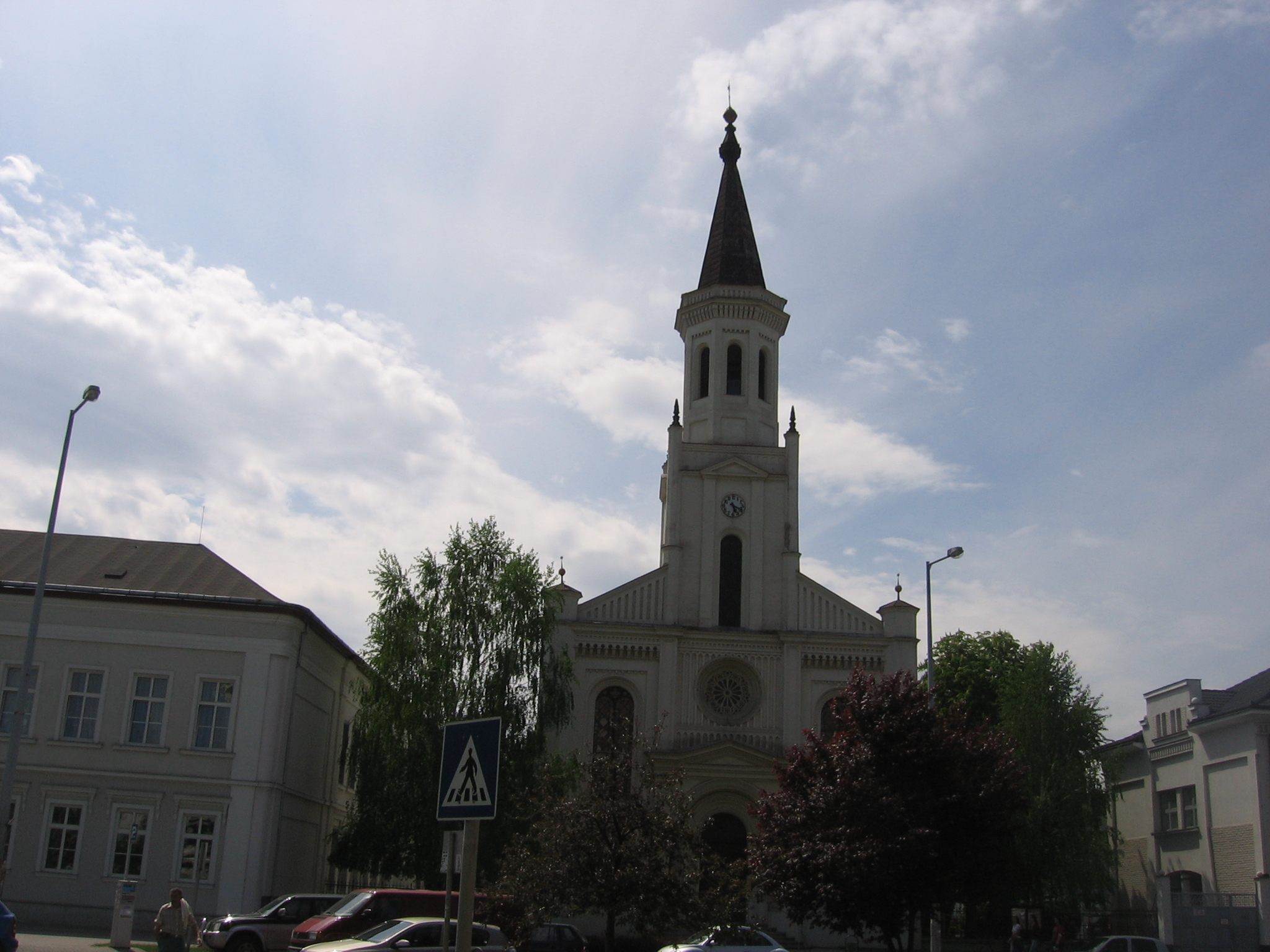 A church (calvinist) in Nyíregyháza Kościół (cerkiew prawosławna?) w Nyíregyháza This is a photo of a monument in Hungary, Identifier: 8361